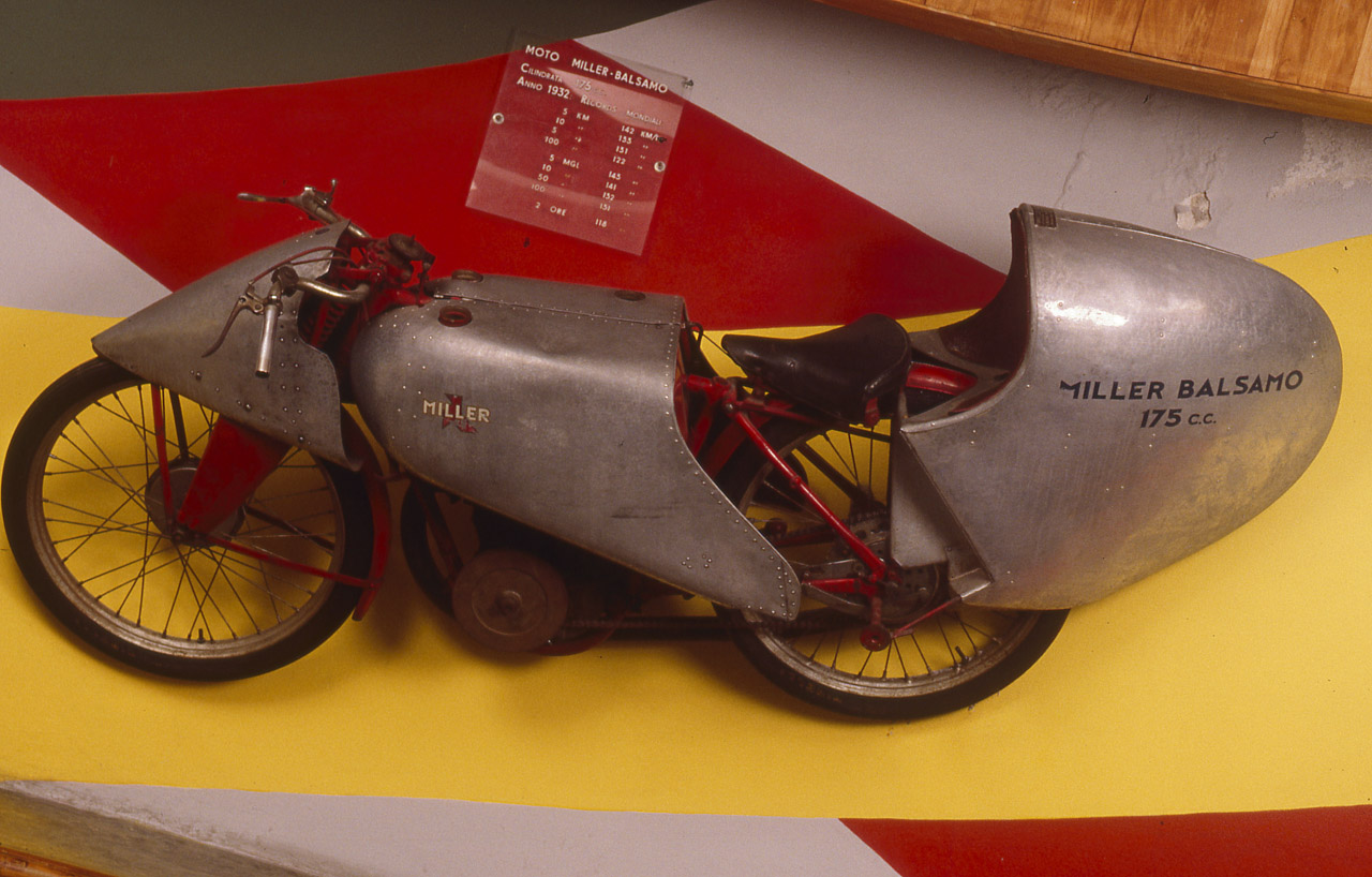 Motocicletta da record con motore monocilindrico a quattro tempi, con 175 cc di cilindrata. Il telaio tubolare, verniciato di rosso, è coperto da una carenatura aerodinamica in lamiera, divisa in tre elementi a rivestimento della parte anteriore, del serbatorio e della coda. L'accensione è a magnete. Il comando del cambio è a pedale. La motocicletta è dotata di una sella imbottita in pelle nera. Sulla carenatura anteriore è fissato un piccolo smalto con la raffigurazione di San Cristoforo portante il Cristo. Funzione Superamento dei record mondiali di velocità Notizie storico-critiche A bordo di questa motocicletta il pilota Carlo Fumagalli conquistò otto record mondiali nel 1932. Per la preparazione della motocicletta, i fratelli Balsamo ebbero la collaborazione delle Officine S.I.A.I. di Sesto Calende.